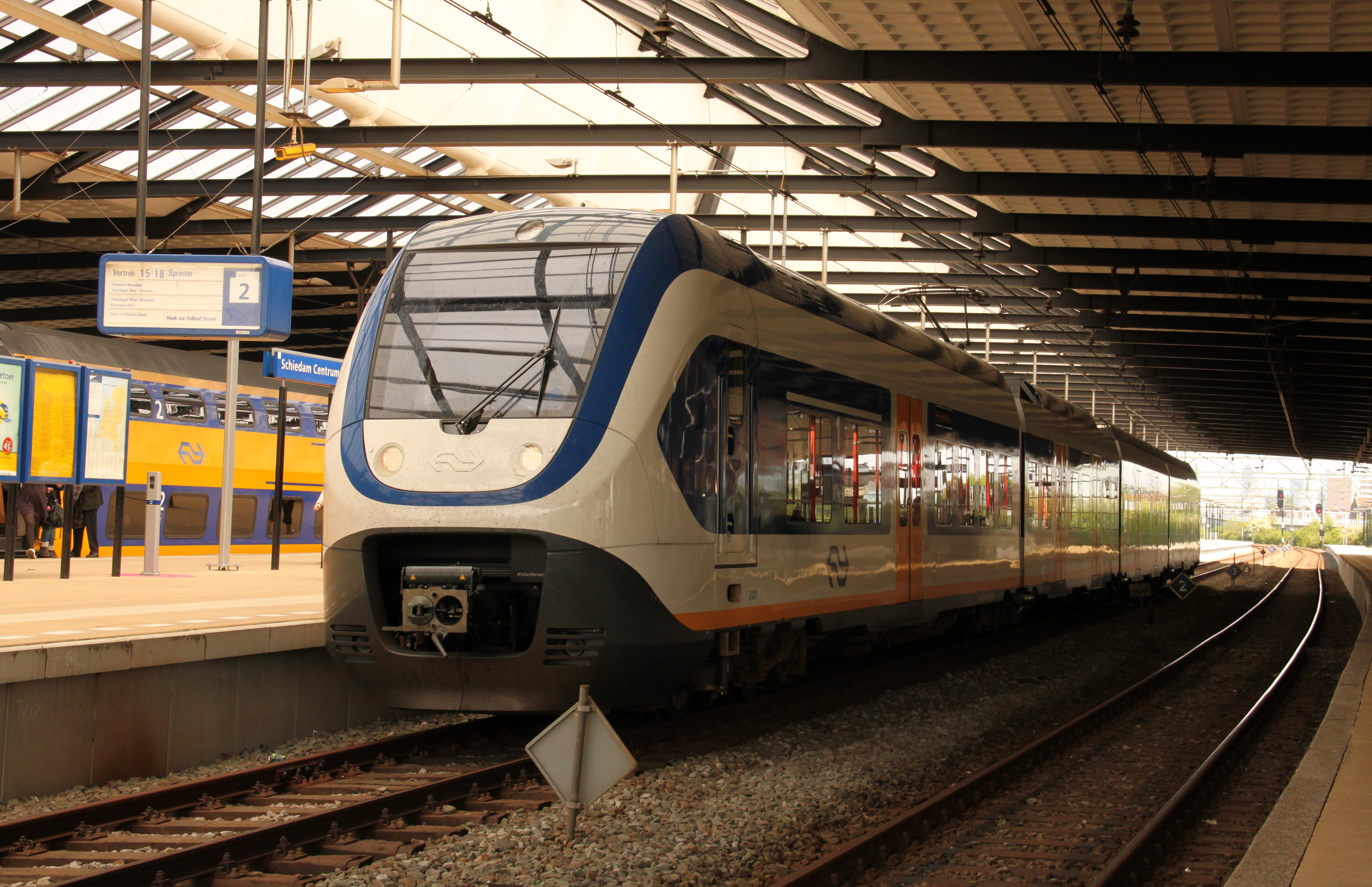 Een Sprinter Lighttrain uit Den Haag te Schiedam Centrum.